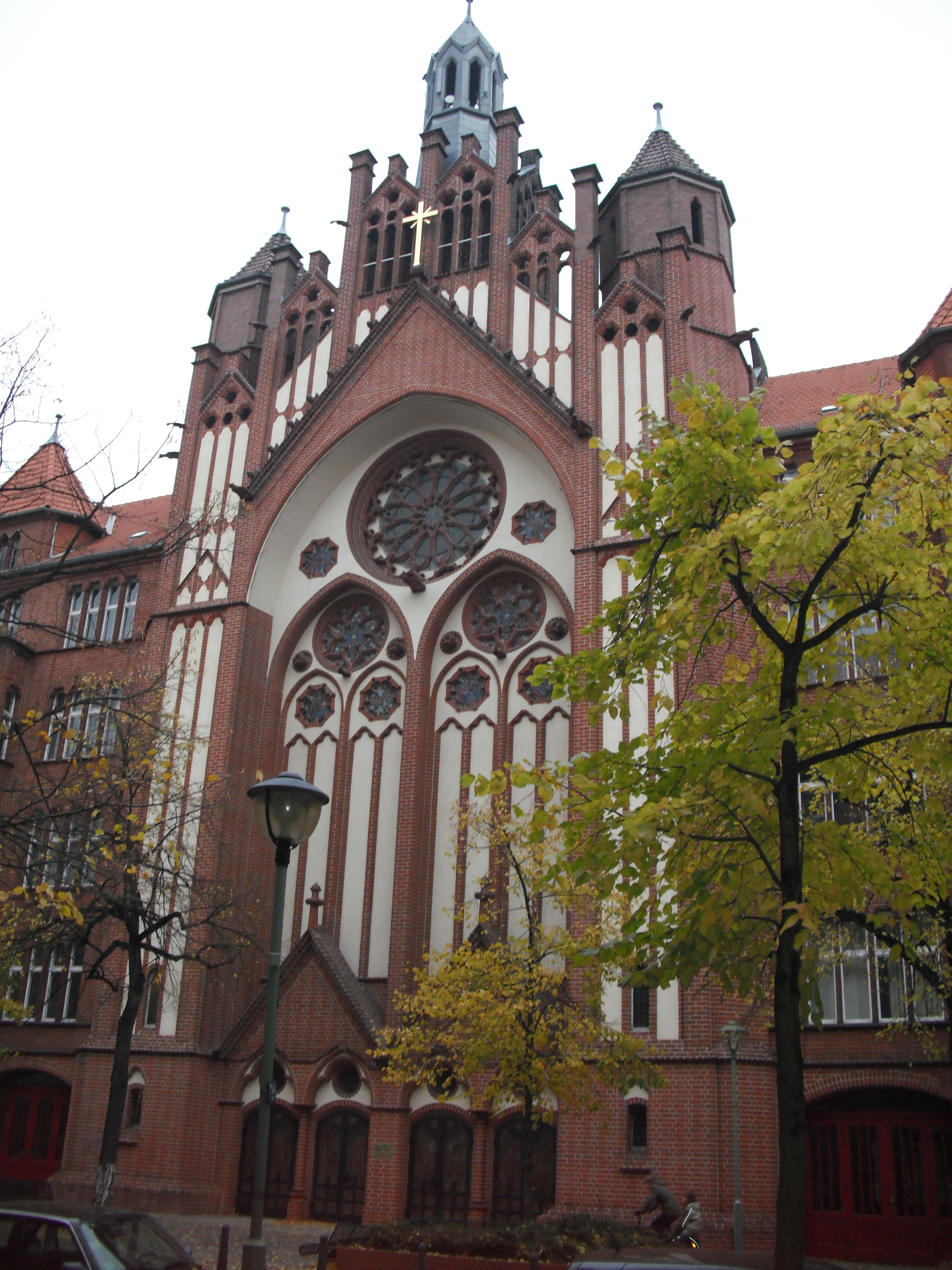 Außenaufnahme der Kirche von vorne